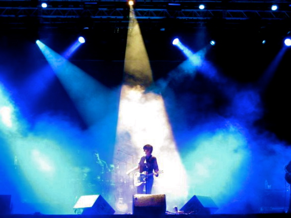 Concierto de Ely Guerra en el 8vo. Festival de las Almas, Valle de Bravo.